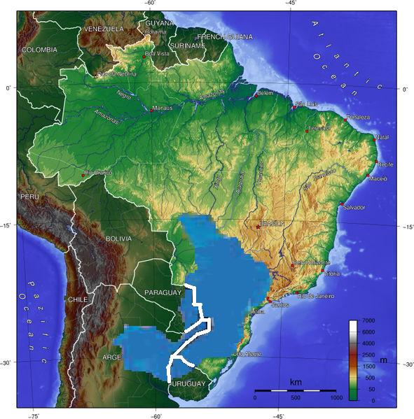 Ubicación del Acuífero Guaraní en el mapa de Suramérica.